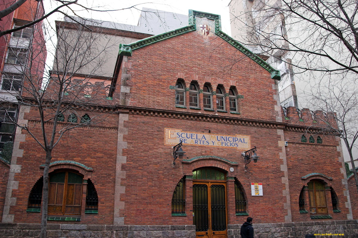 Escola Zafra al c/ Rogent 51 (Barcelona-Catalunya), obra de Antoni Falguera i Pere Falqués. 1911.